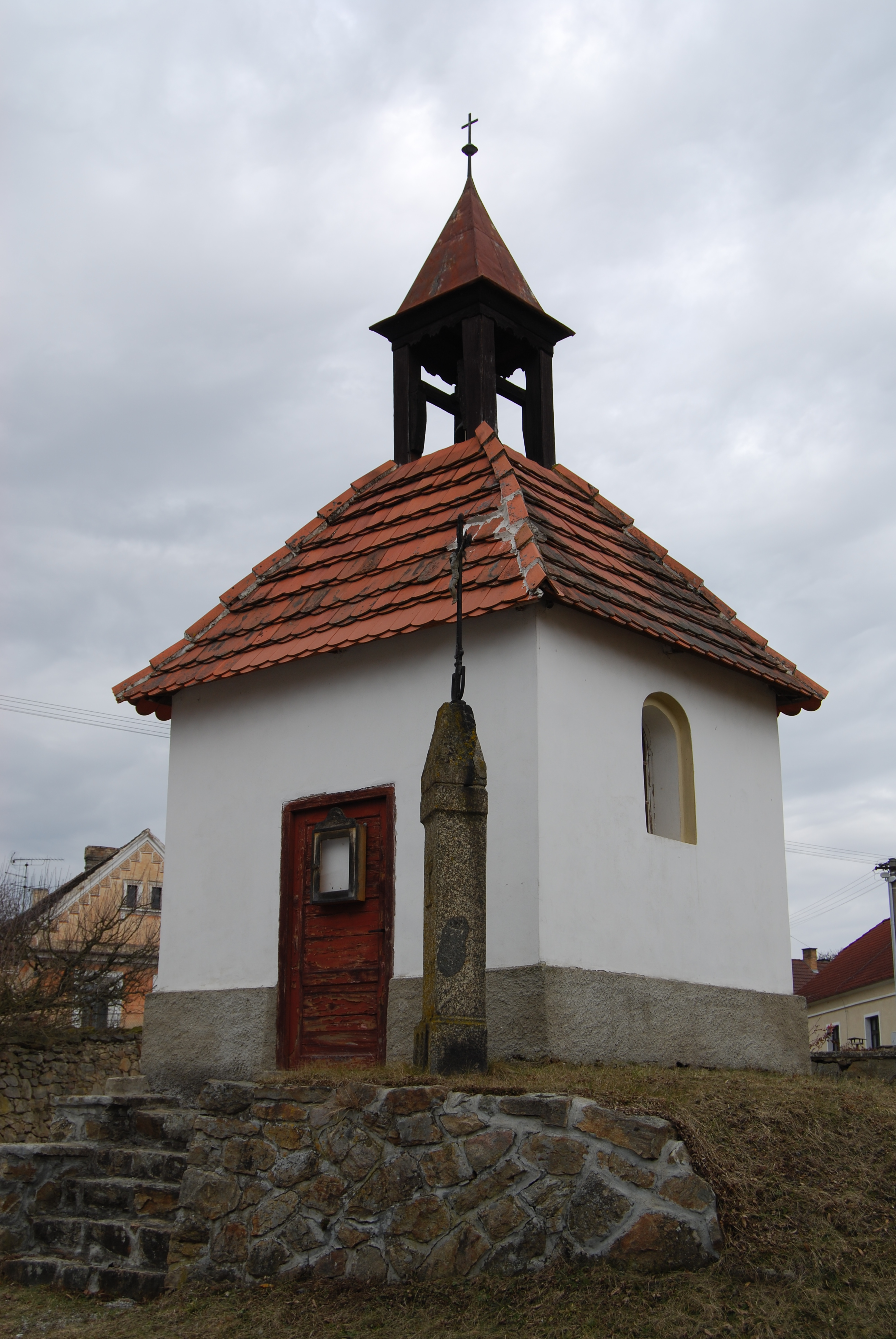 Návesní kaple z 1.pol. 19. století. Olešná. Okres Písek. Česká republika.